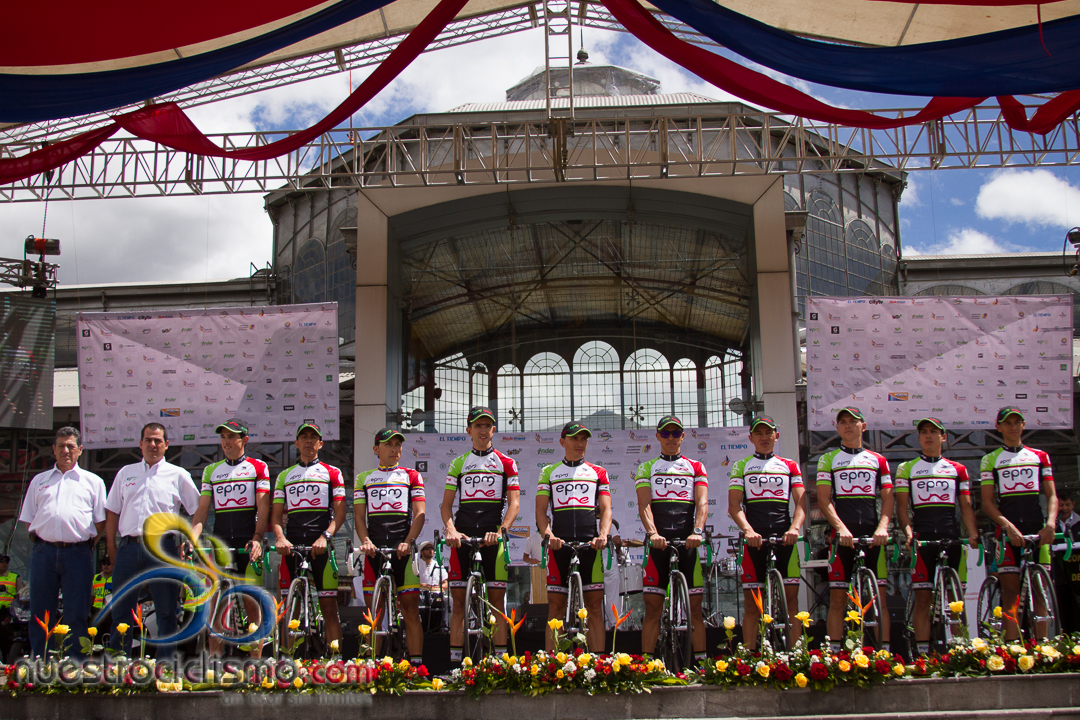 Presentación de equipos - Vuelta a Colombia 8 de junio de 2013 Quito, Ecuador